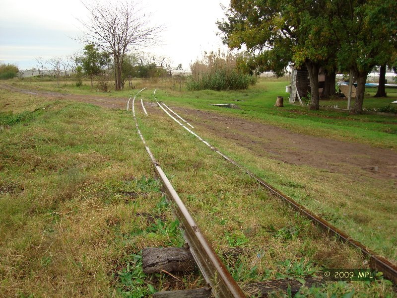 Curva del empalme entre la vía de la CGBA y del FCPBA cerca de Angel Etcheverry, La Plata, Buenos Aires, Argentina